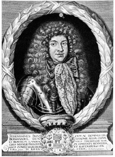 BErnhard II., Herzog von Sachsen-Jena